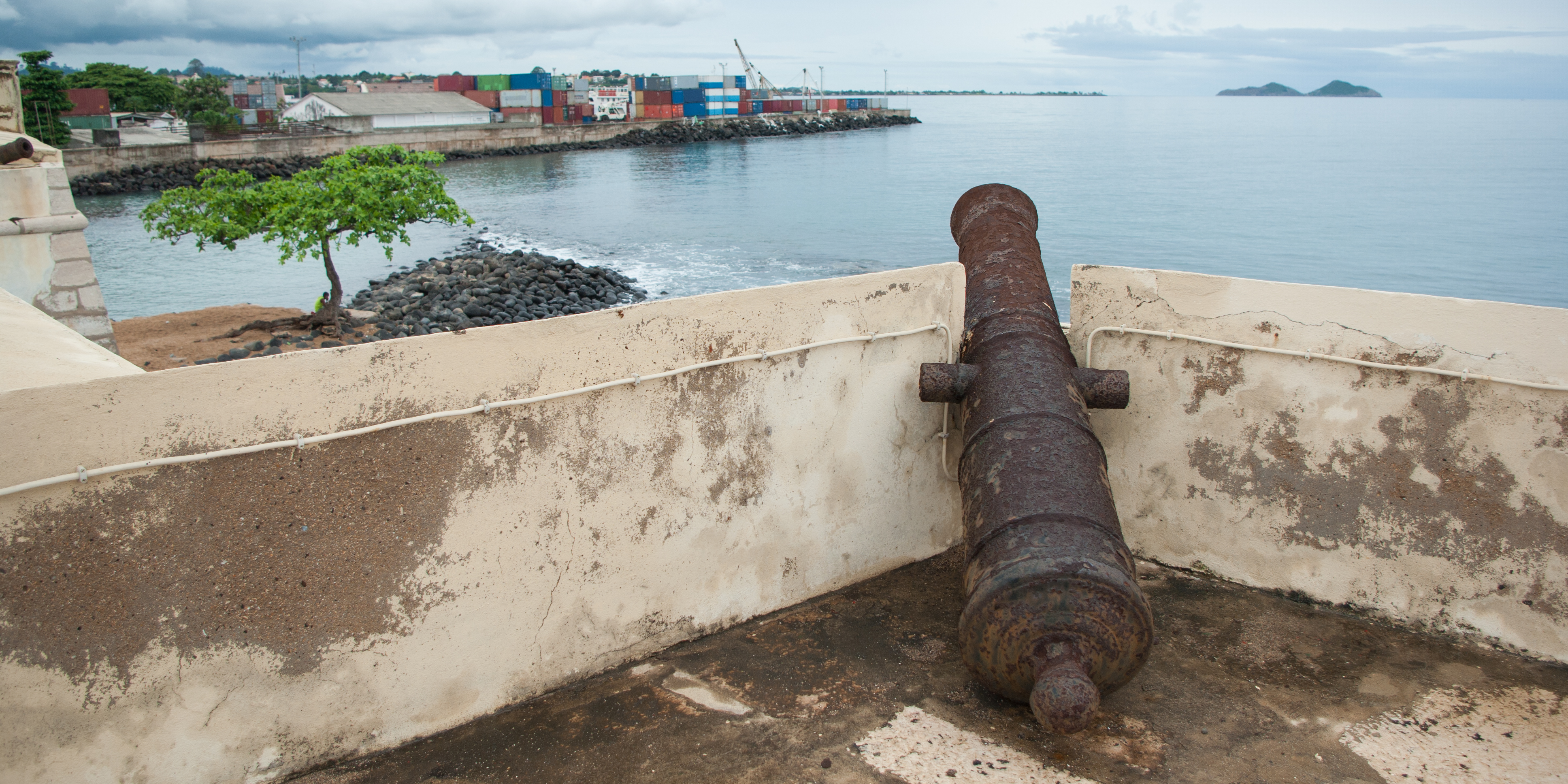 Forte de São Sebastião National Museum (São Tomé)